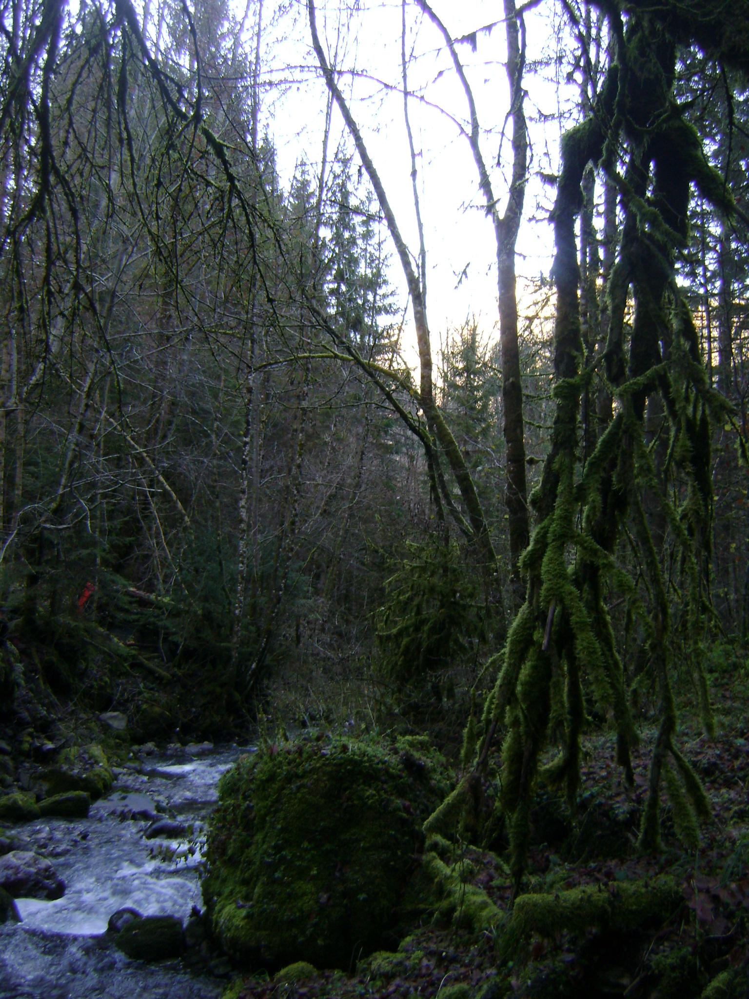 Les "Mystères" de l'Overan.